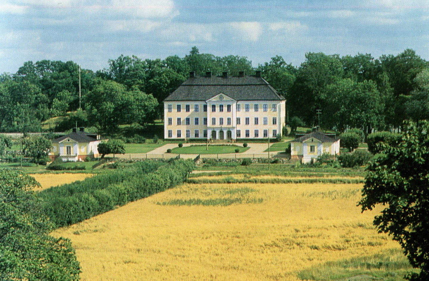 Björksund slott med flygelbyggnaderna